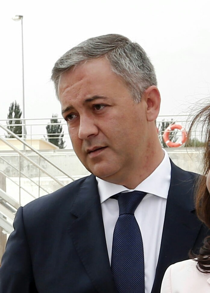 Aquilino Iniesta, viceconsejero de Fomento de Castilla-La Mancha.